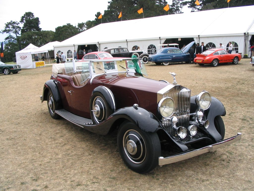 Rolls-Royce Phantom II Thrupp & Maberly Baujahr 1935 in Pebble Beach, Kalifornien.